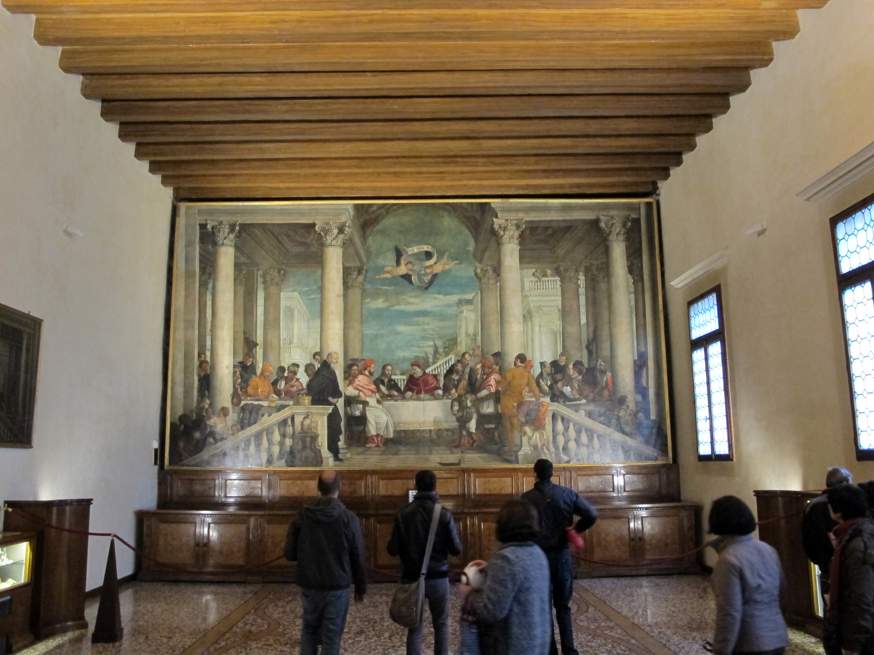 Paolo veronese, cena di s. gregorio magno